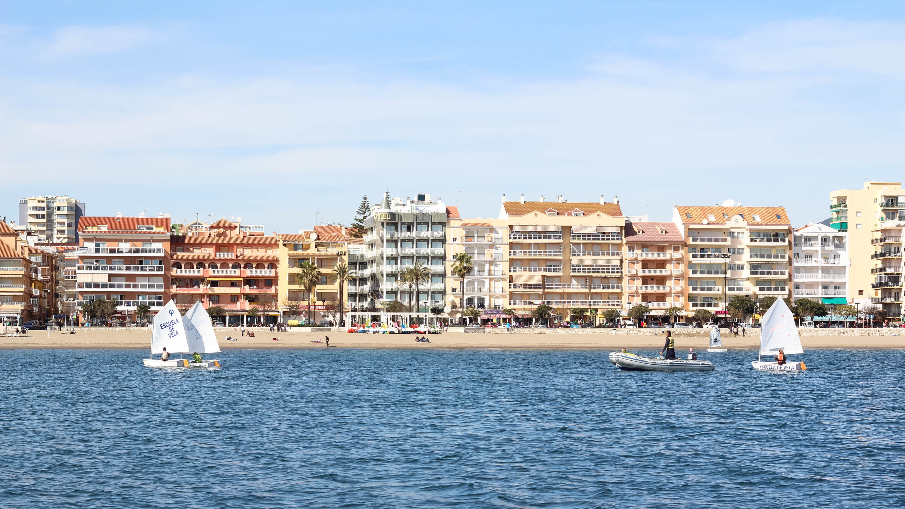 Fuengirola, Costa del Sol, España.